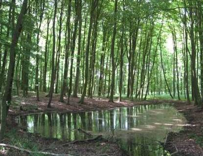 Wald und feuchte Senke im Naturschutzgebiet Schlavenkensee im Landkreis Mecklenburg-Strelitz